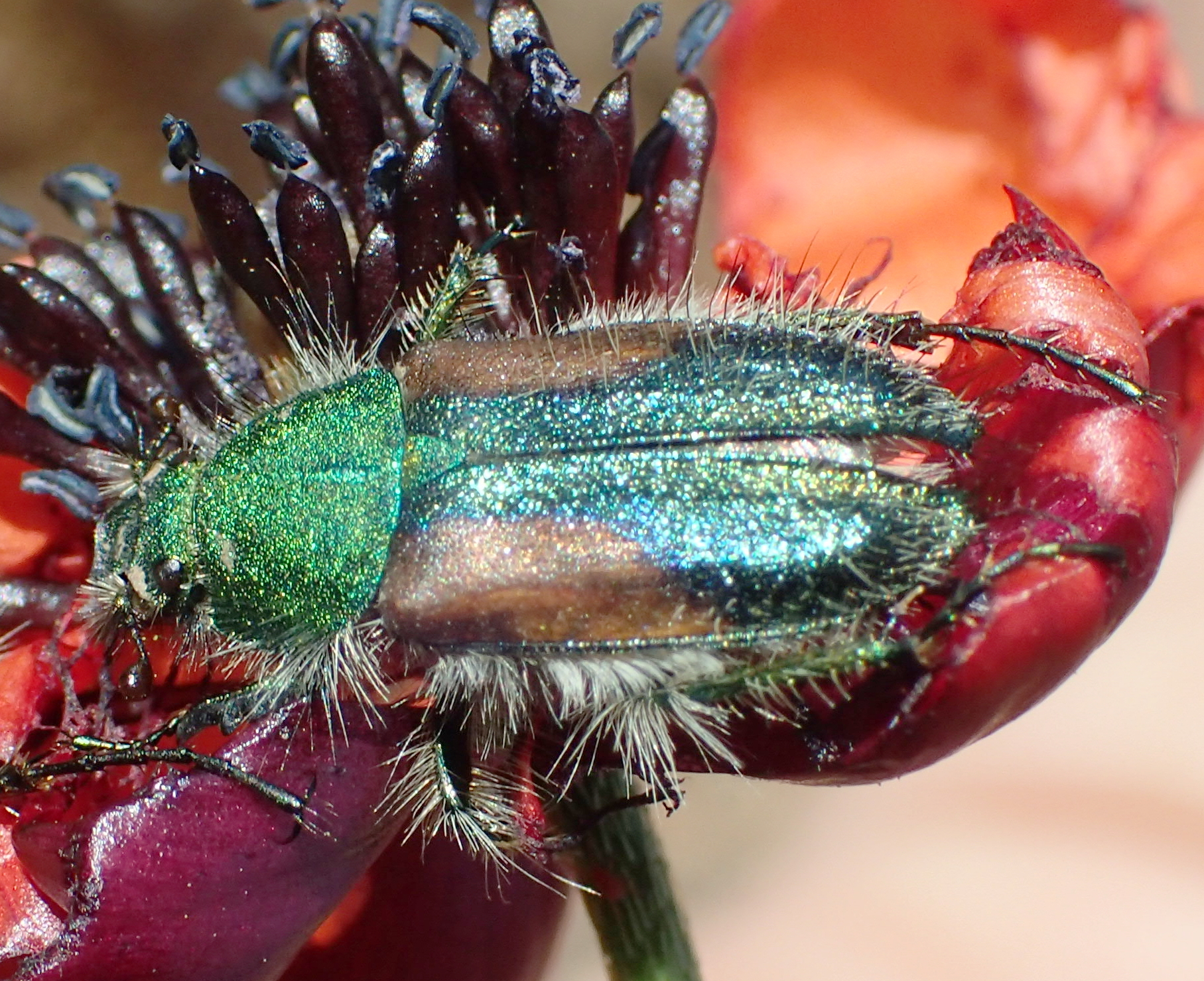 Pygopleurus apicalis aus Griechenland, Peloponnes, bei Olympia